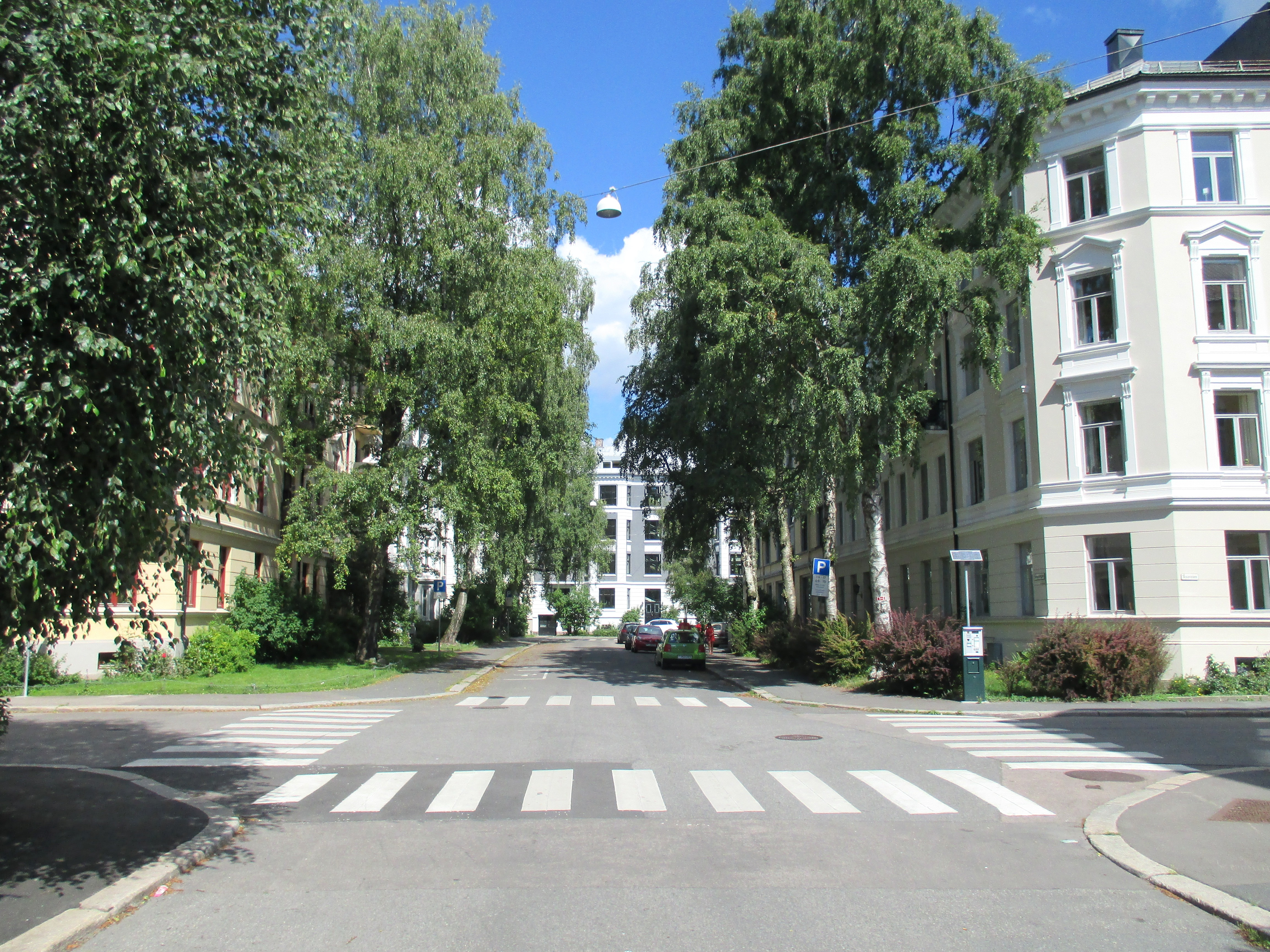 Sorgenfrigata i Oslo